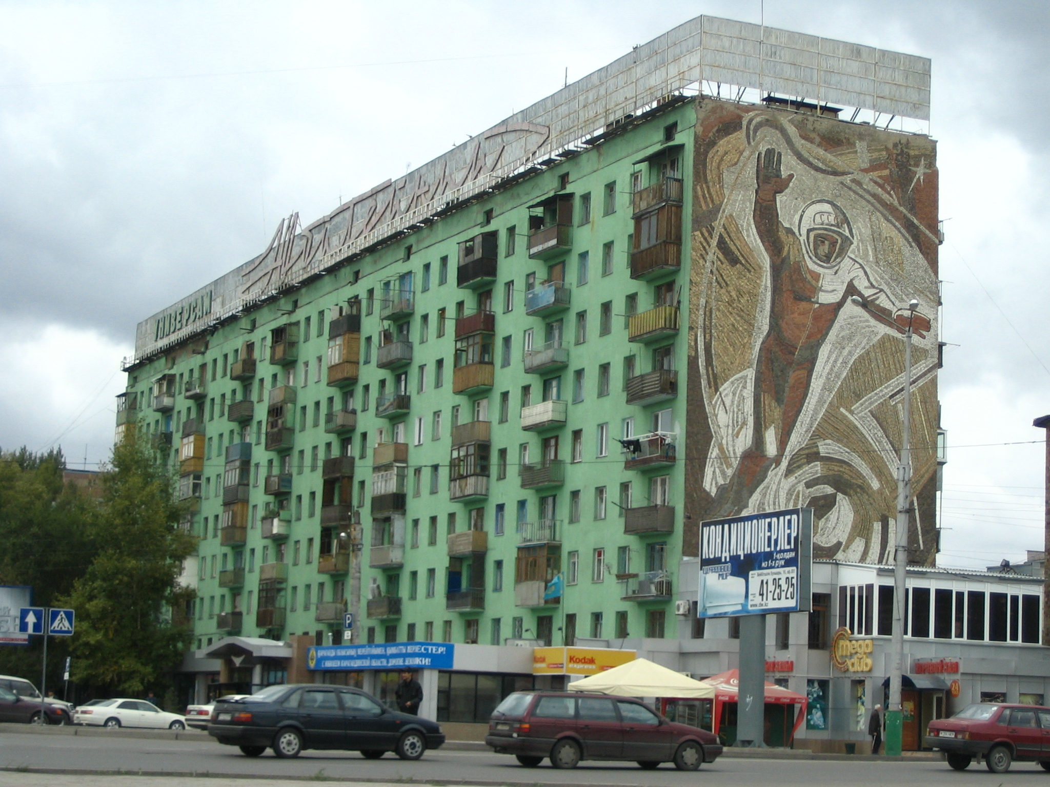 Название: Универсам «Юбилейный». Город Караганда. Проспект Нуркена Абдирова на пересечении с улицей Гоголя